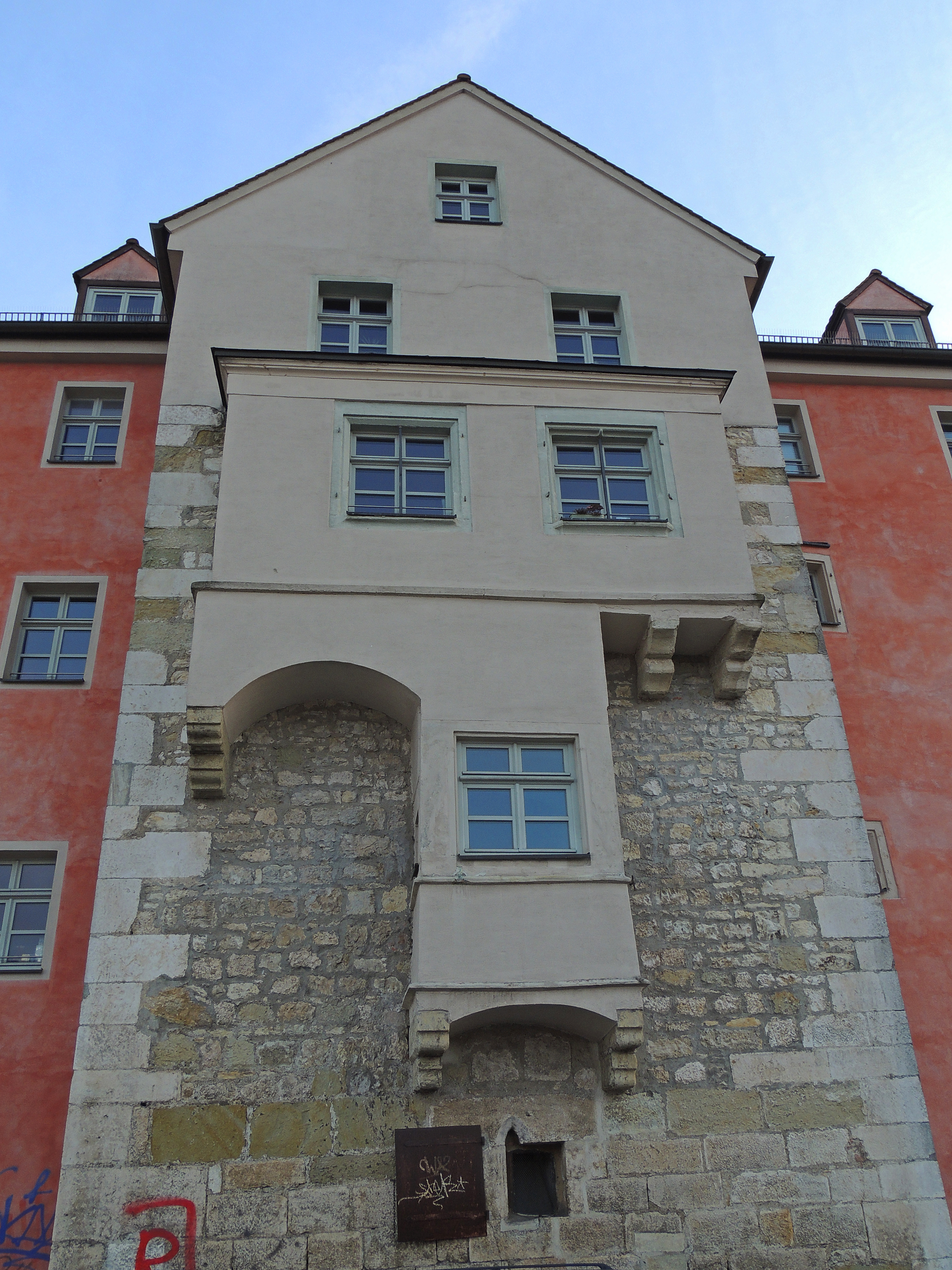 Das Mauthaus mit doppeltem Tor diente zur Erhebung der Abgaben für die Freie Reichsstadt Regensburg. Den ältesten baulichen Abschnitt bildet zur Donau hin ein Befestigungsturm der Stadtmauer mit Erker und Wehrgang aus der 1. Hälfte des 14. Jahrhunderts. D-3-62-000-631This is a photograph of an architectural monument.